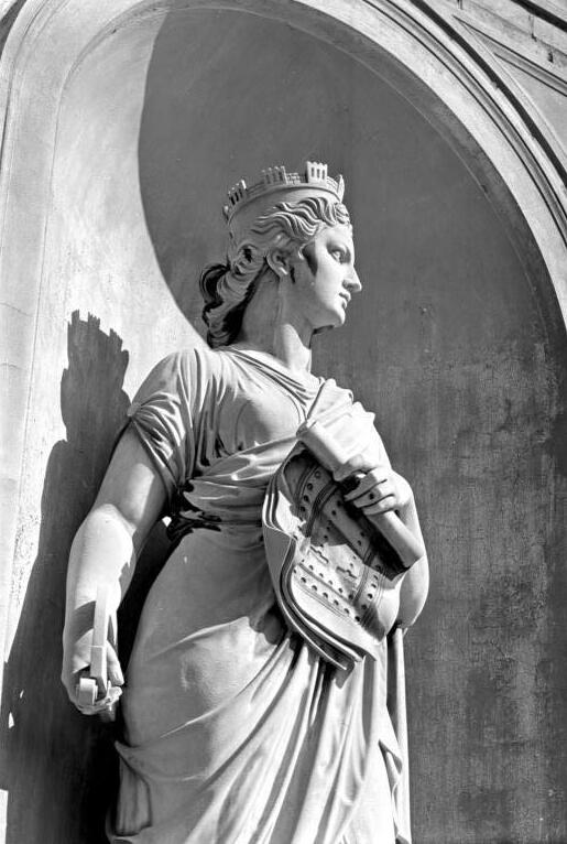 Potsdam.- Sanssouci, Details an der Orangerie